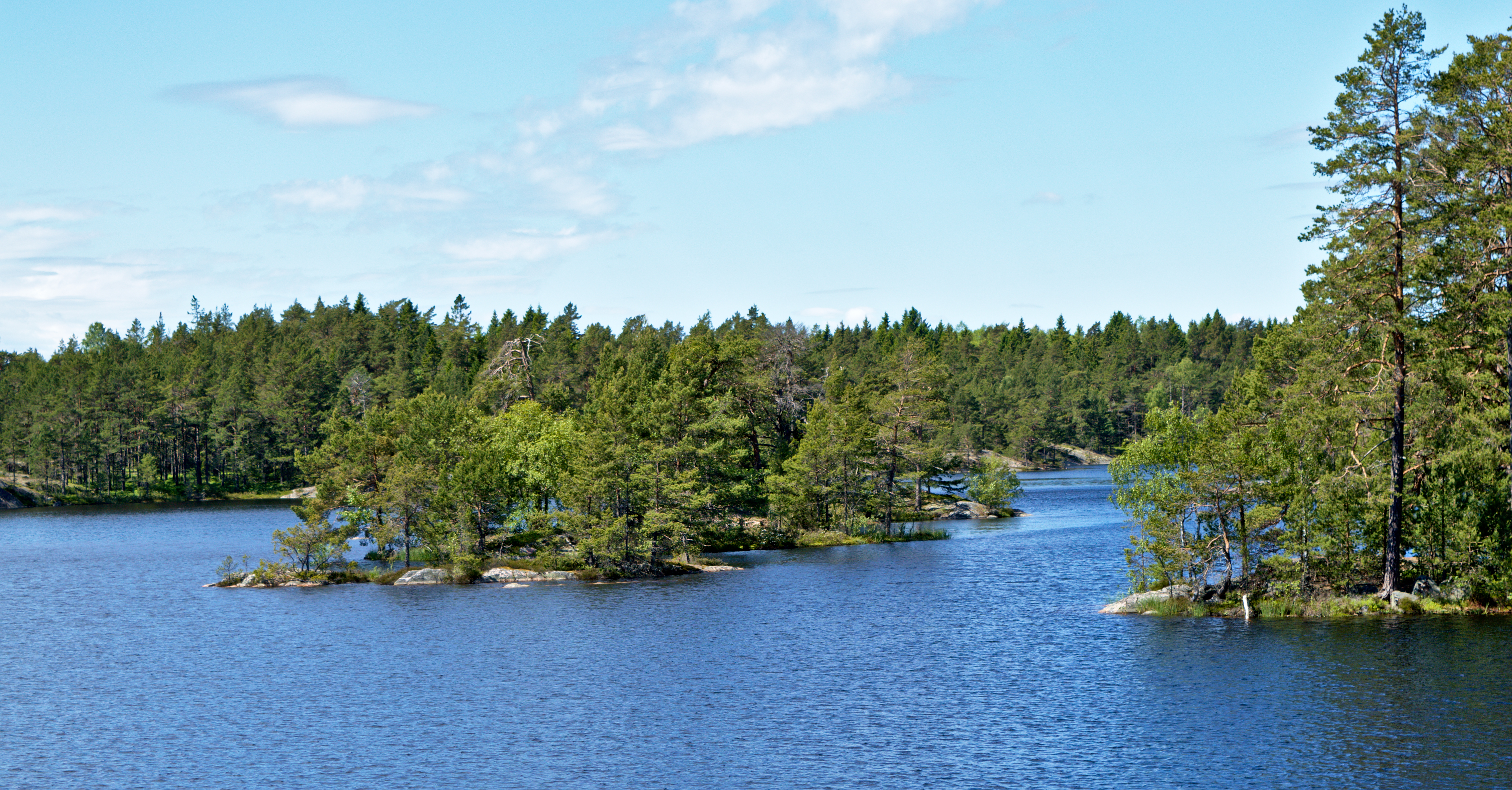 Sjön Vitträsk på Ornö i Stockholms skärgård. De tre öarna i mitten av sjön.